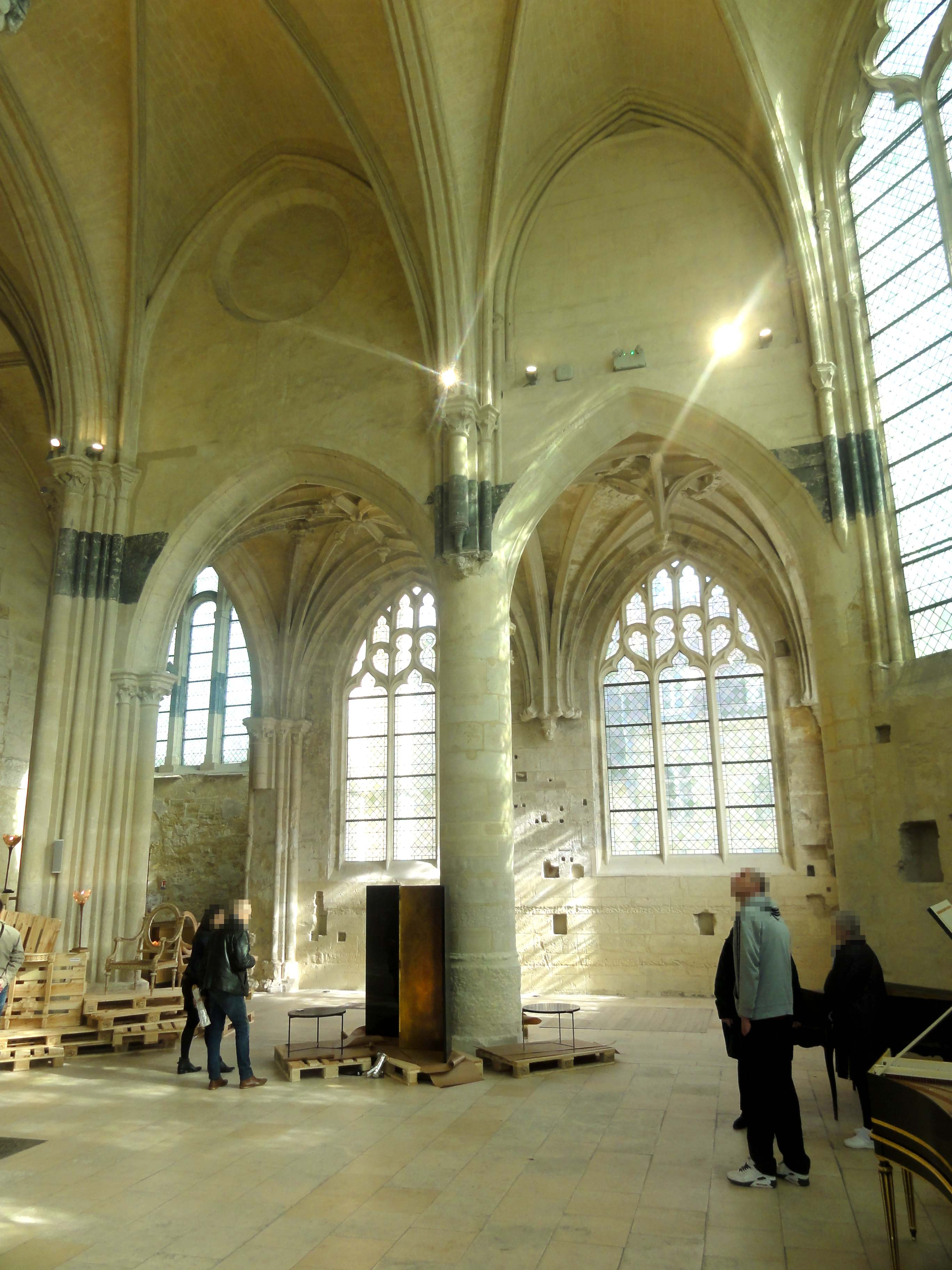 Intérieur de l'église - voir titre.